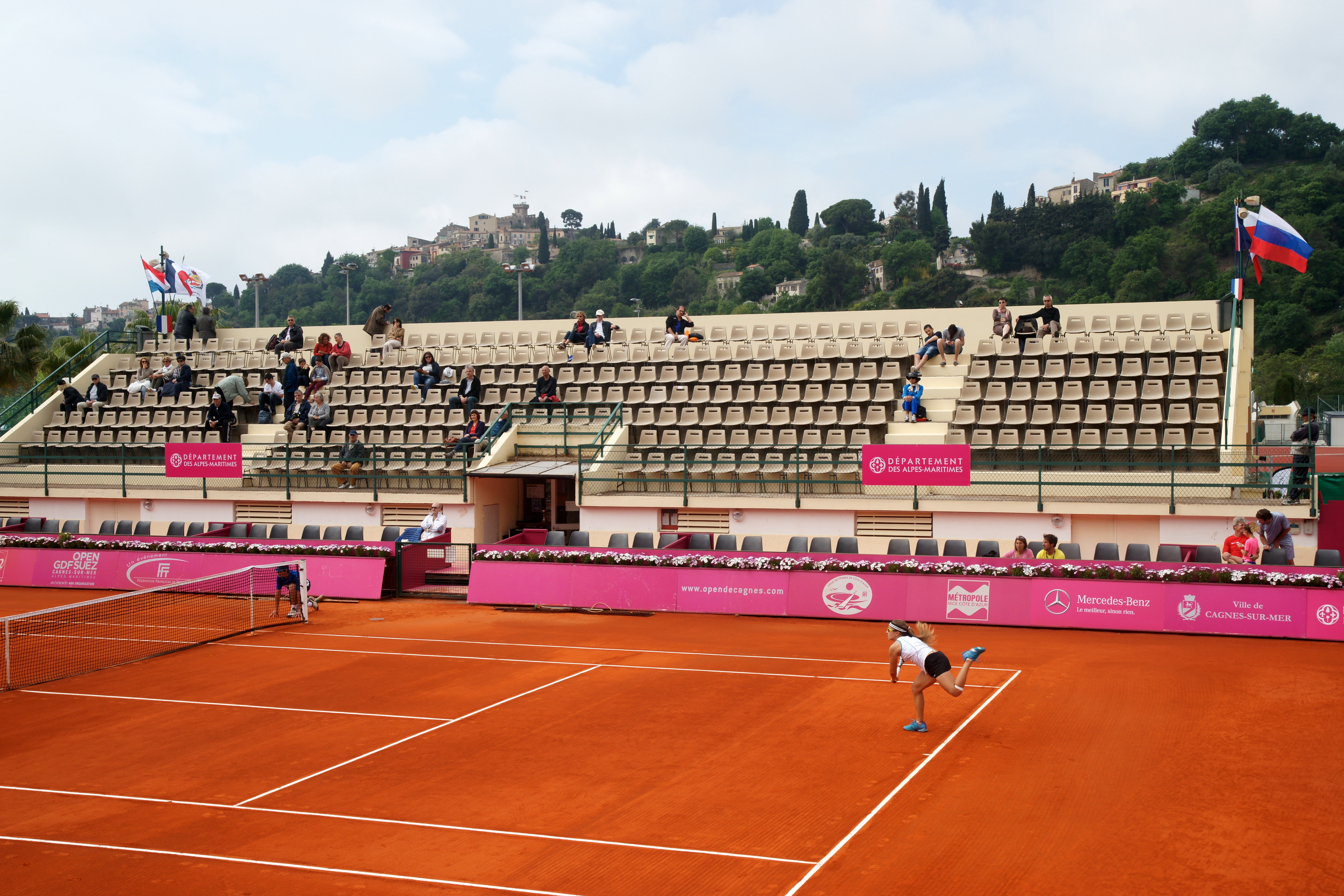 Court central Open GDF Suez de Cagnes-sur-Mer Alpes-Maritimes 2015